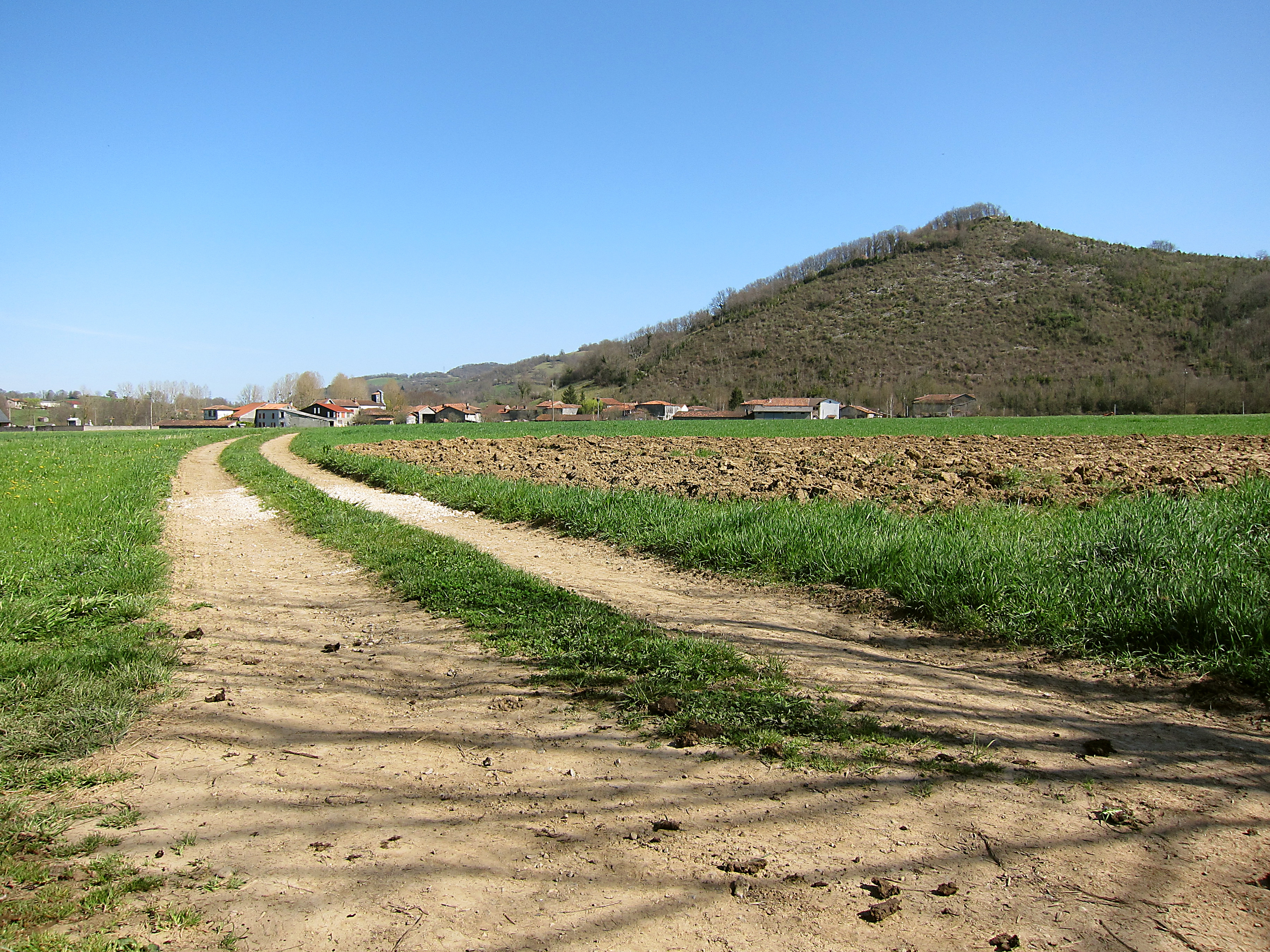 Cazavet (Ariège, Midi-Pyrénées, France) : Vue du village et du Pouech, au sommet duquel se trouvent les ruines du château.